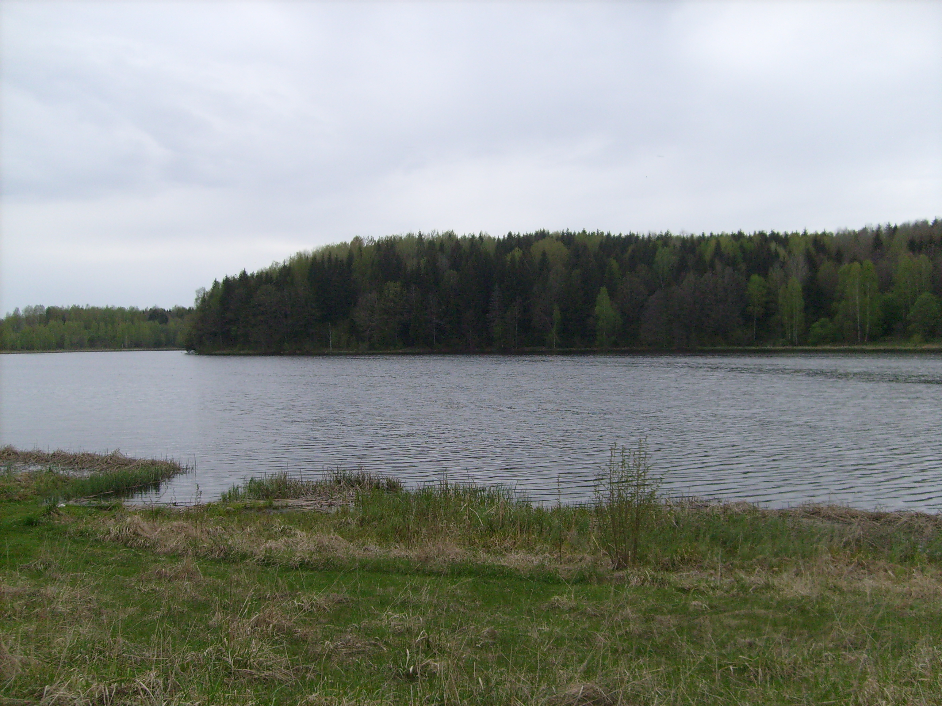 Трилесинское водохранилище (Шиповка)